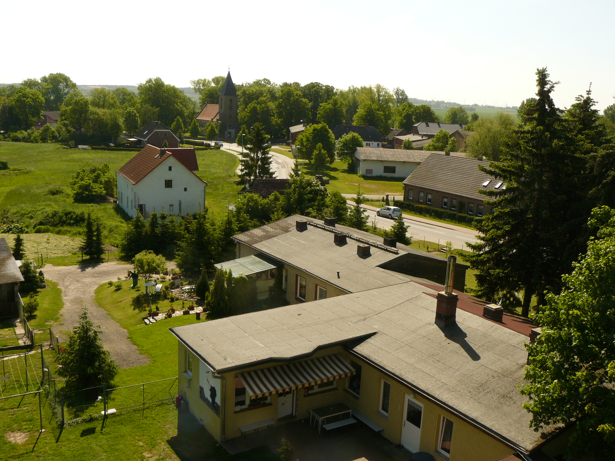 Papendorf